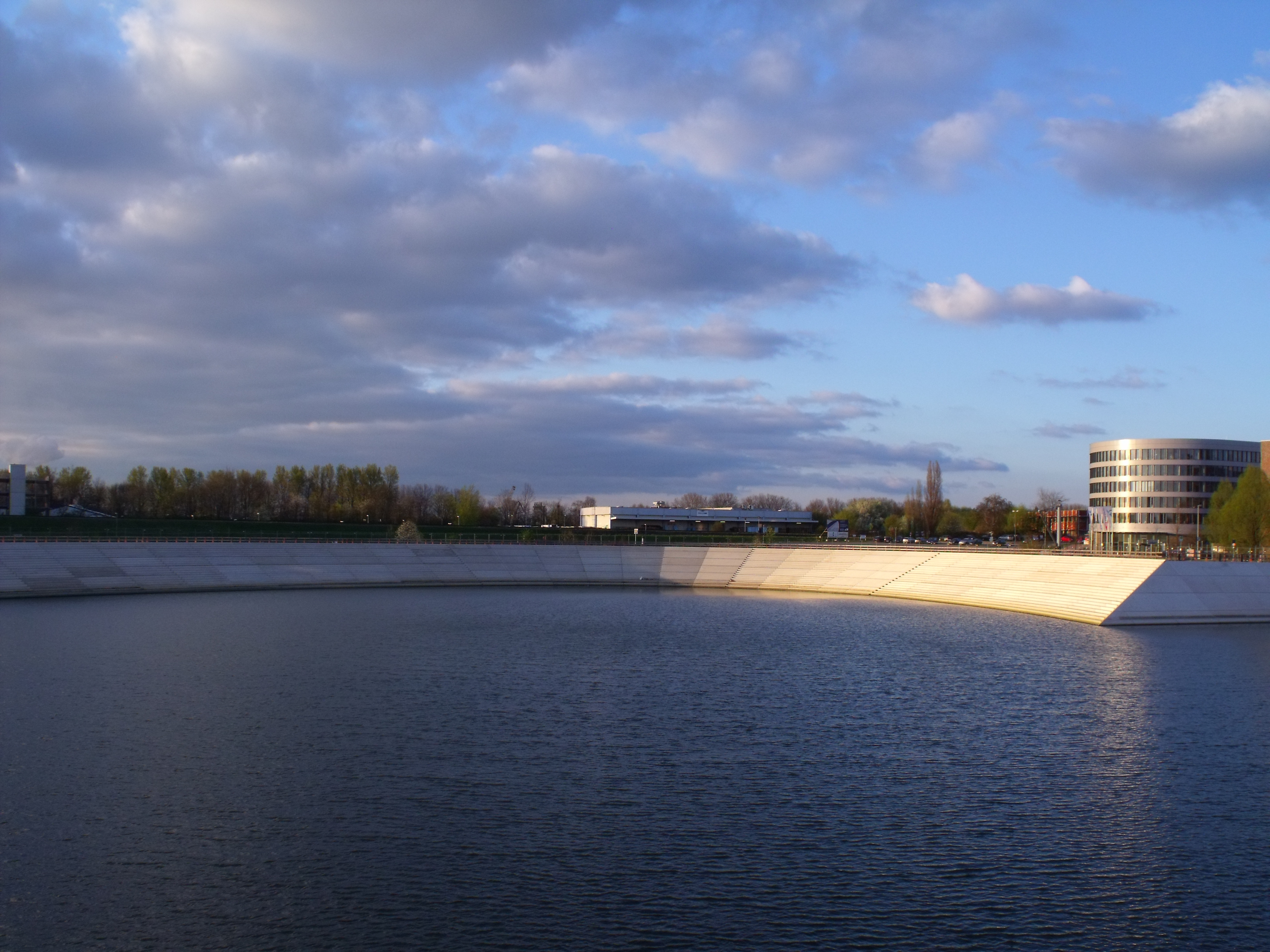 Holzhafen Duisburg